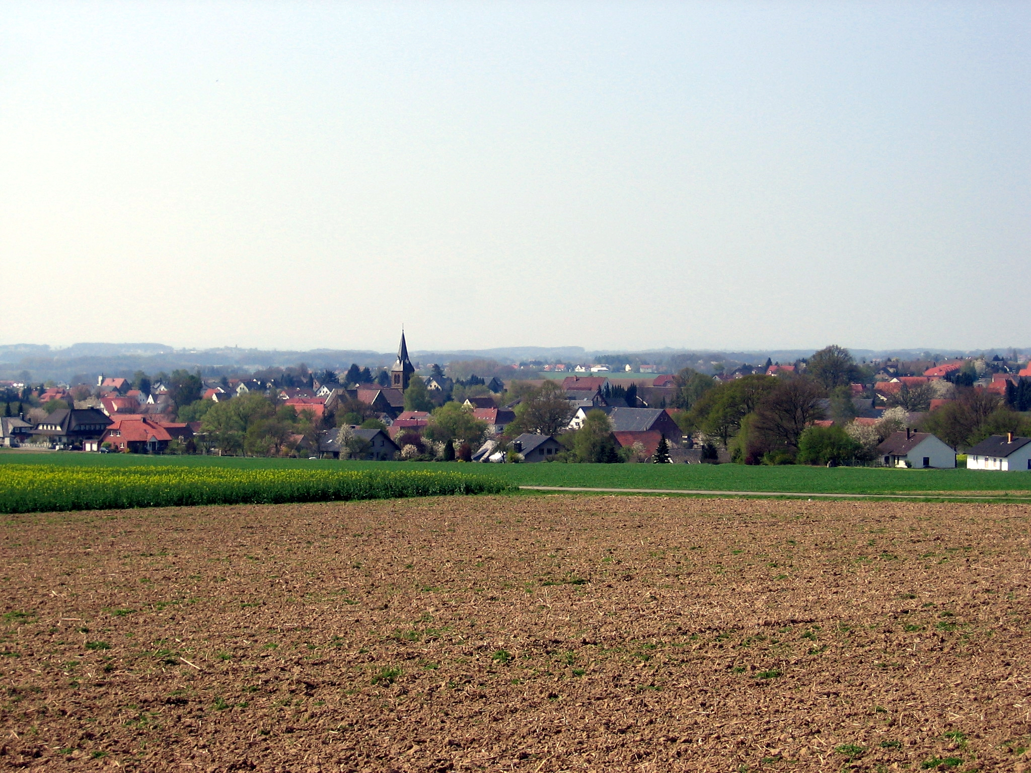 Blick auf Schnathorst vom Wiehengebirge aus.